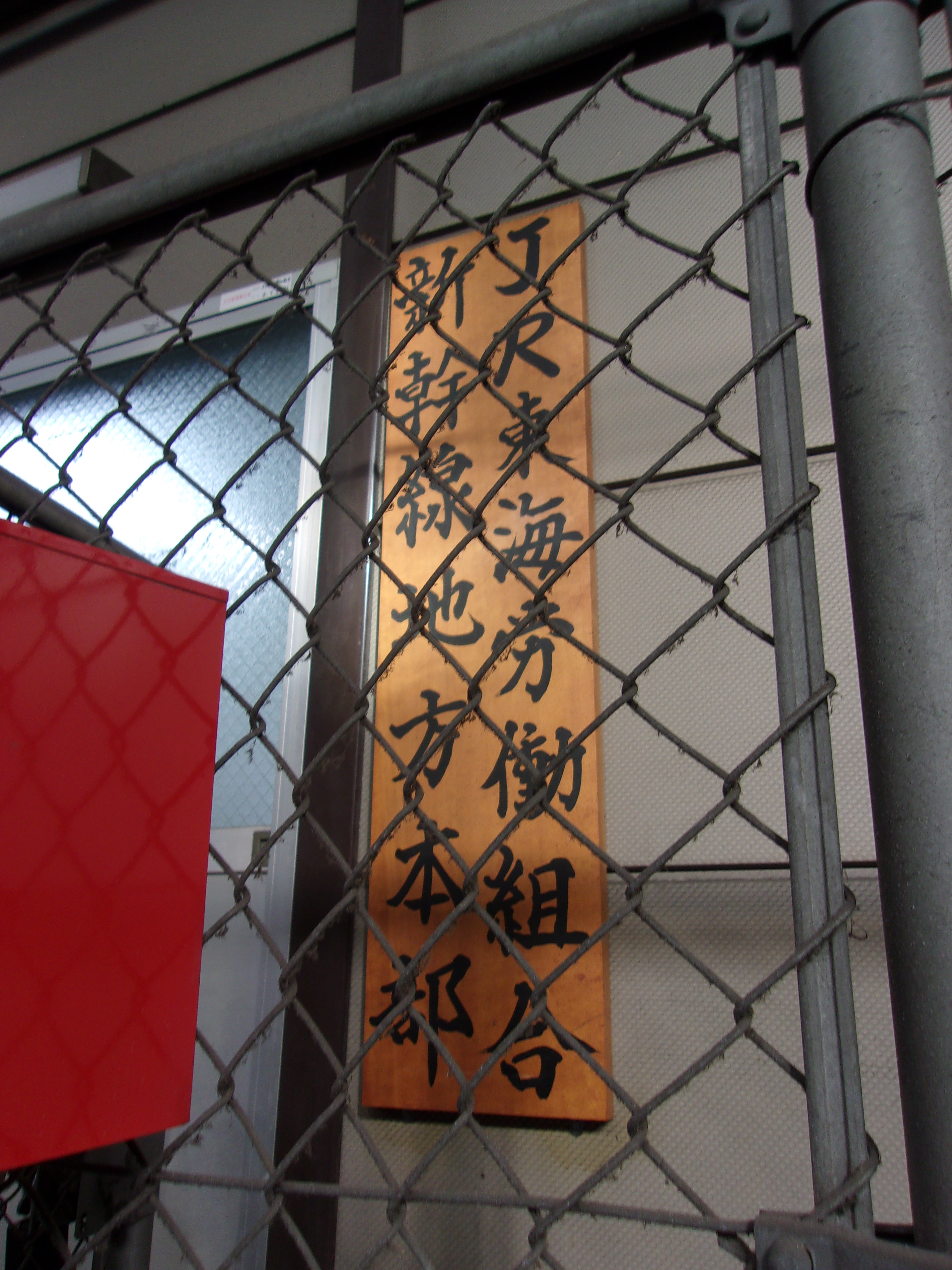 東海道新幹線第四有楽高架橋下のJR東海労働組合新幹線地方本部事務所